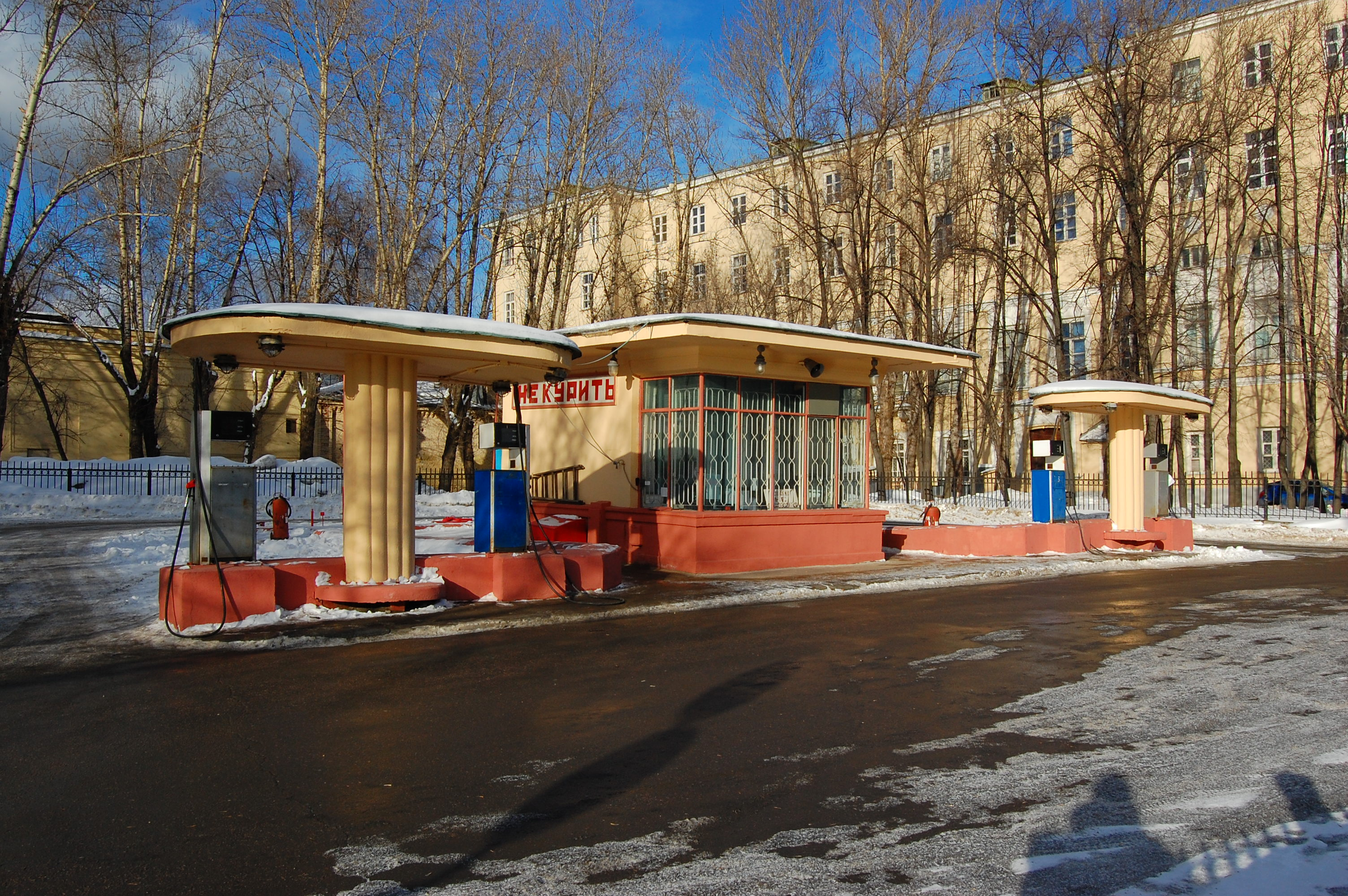 Кремлёвская АЗС на Волхонке